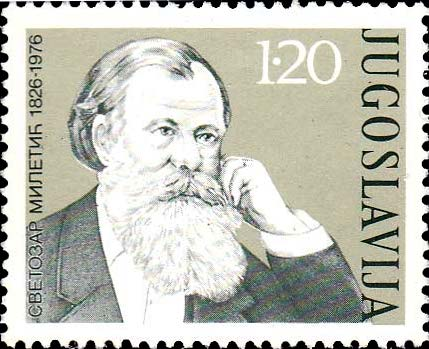 Svetozar Miletić